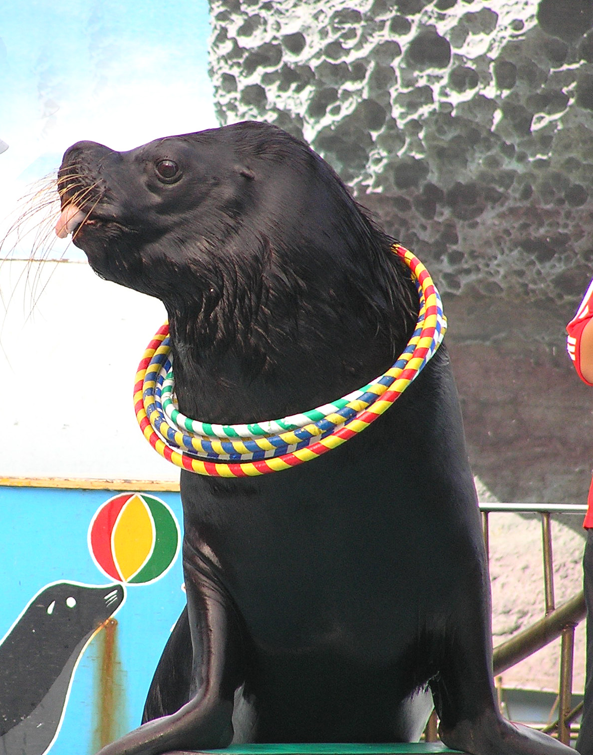 中文（台灣）: 海獅表演_OW